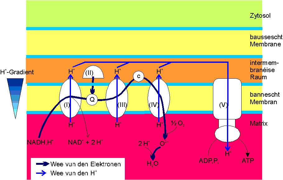 Oxydativ Phosphoryléierung: Schema vun der oxydativer Phosphoryléierung: Q: Quinon-molekül c: Cytochrom c-molekül Komplexer (I) bis (V).